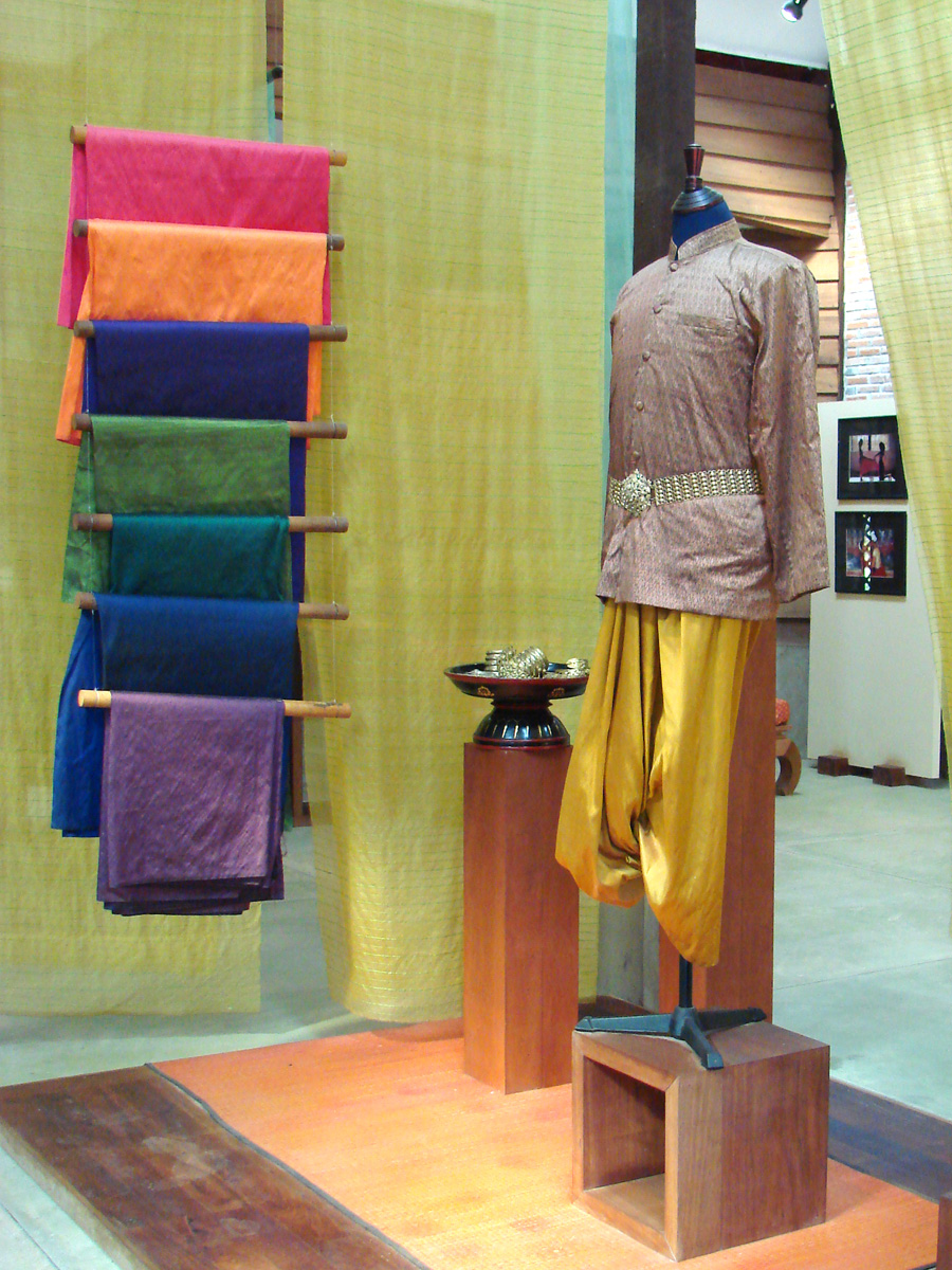 Espace de présentation du centre national de la soie des Artisans d'Angkor Au cours des dernières années, Artisans d’Angkor a étendu son champ d'activités permettant de sortir l'entreprise du cadre traditionnel de l'artisanat, en particulier vers des activités culturelles, de décoration et de création de gammes de produits haut de gamme destinés à une clientèle internationale ciblée.